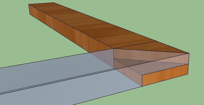 Rálapolás 45 fokos illesztéssel